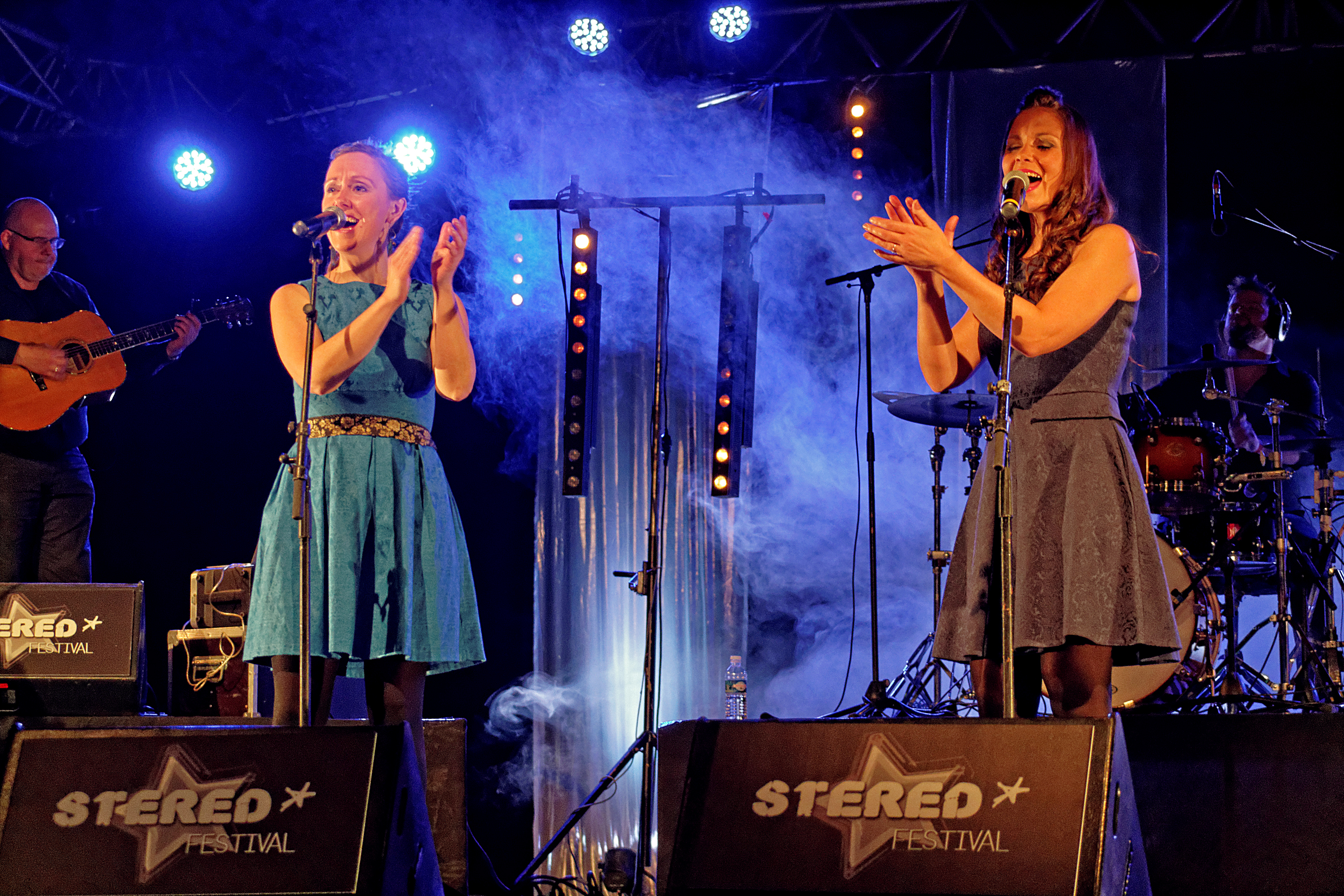 Urban Trad, dans sa nouvelle formation, en tournée en Bretagne, dans le cadre du Stered Festival le 13 Novembre 2015 au Parc des Expos de Langolvas à Morlaix.